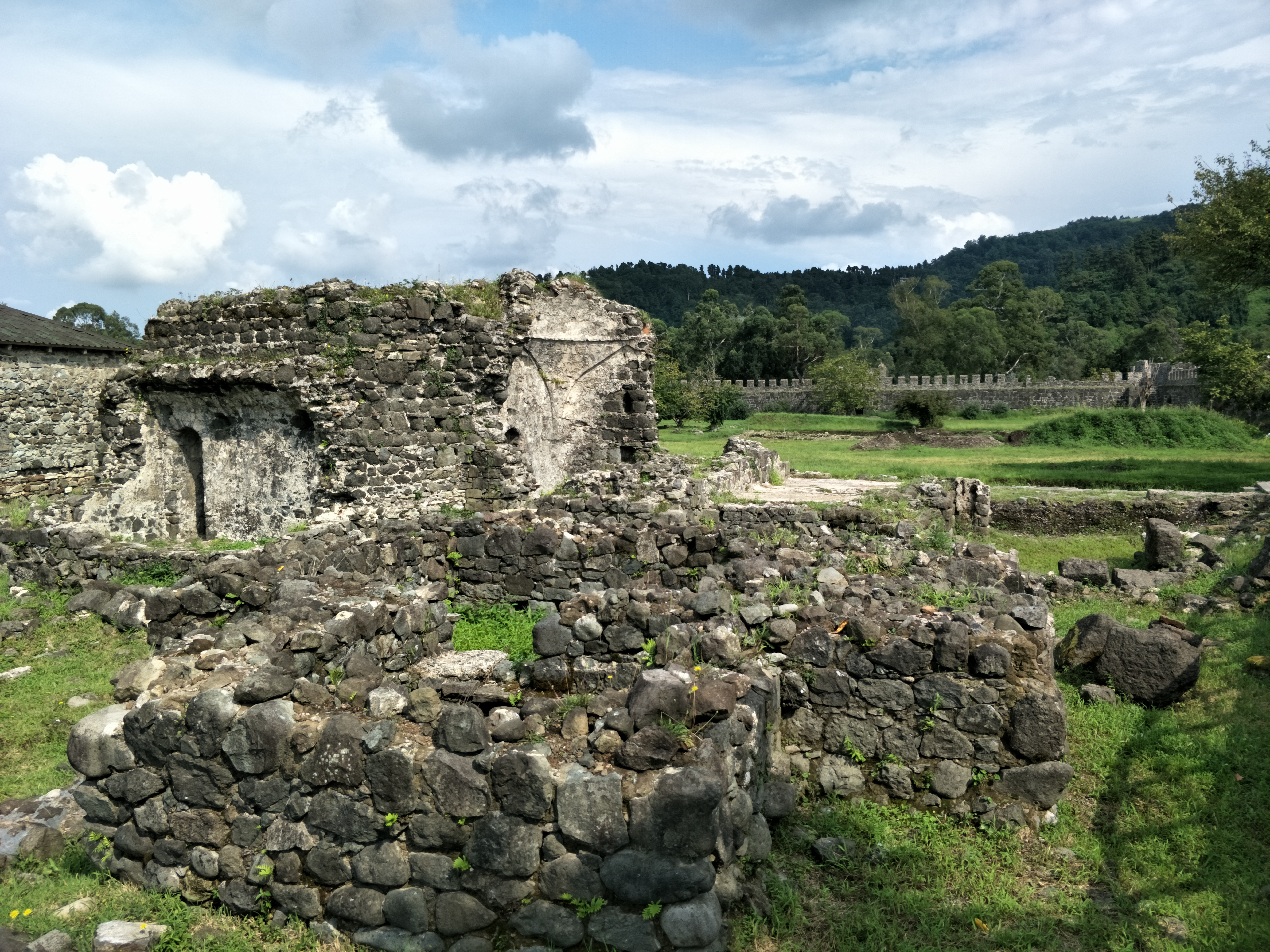 Крепость Гонио